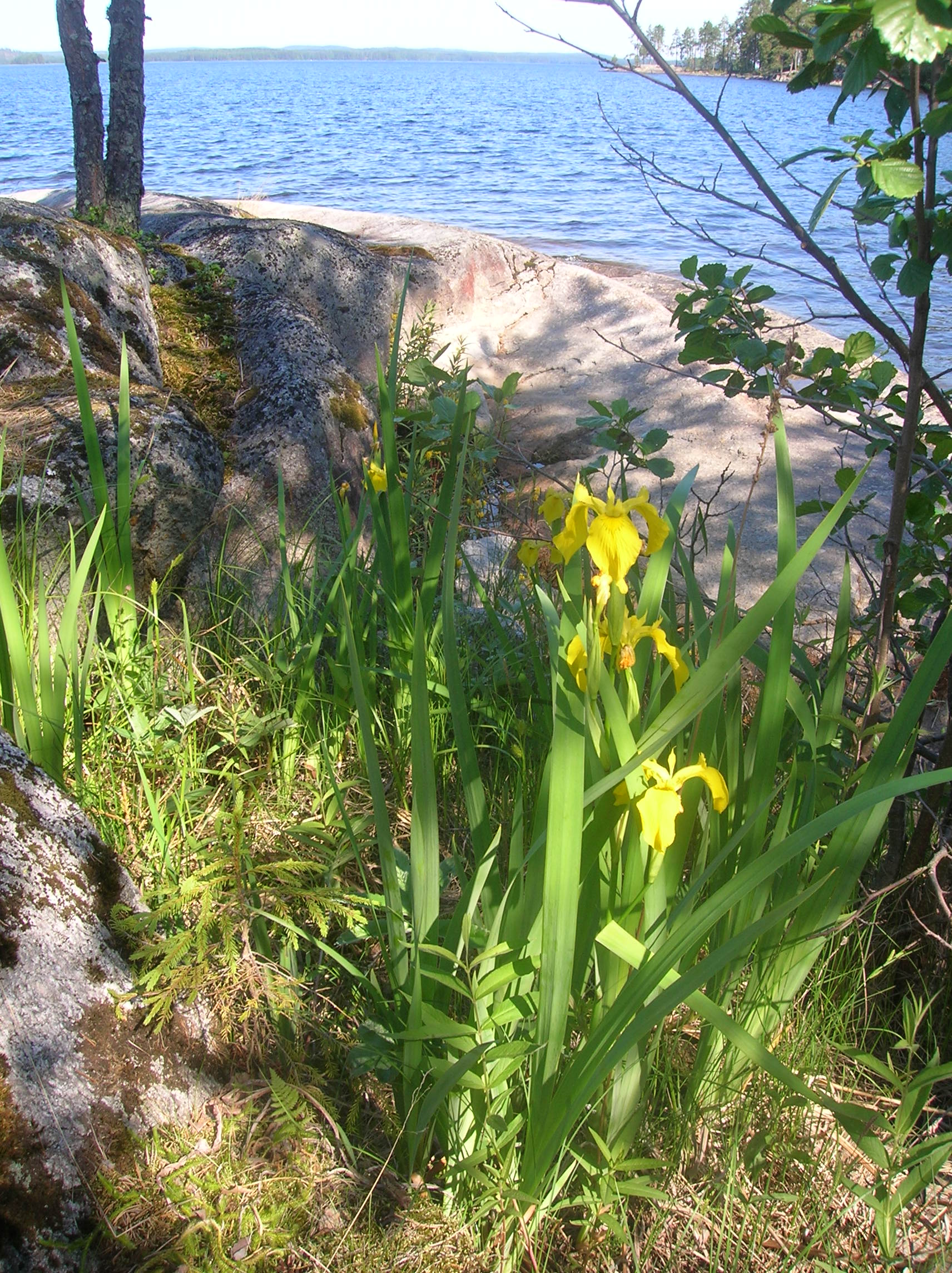 Luonnonkukkia Kynsiveden eteläosassa Paskosaarella